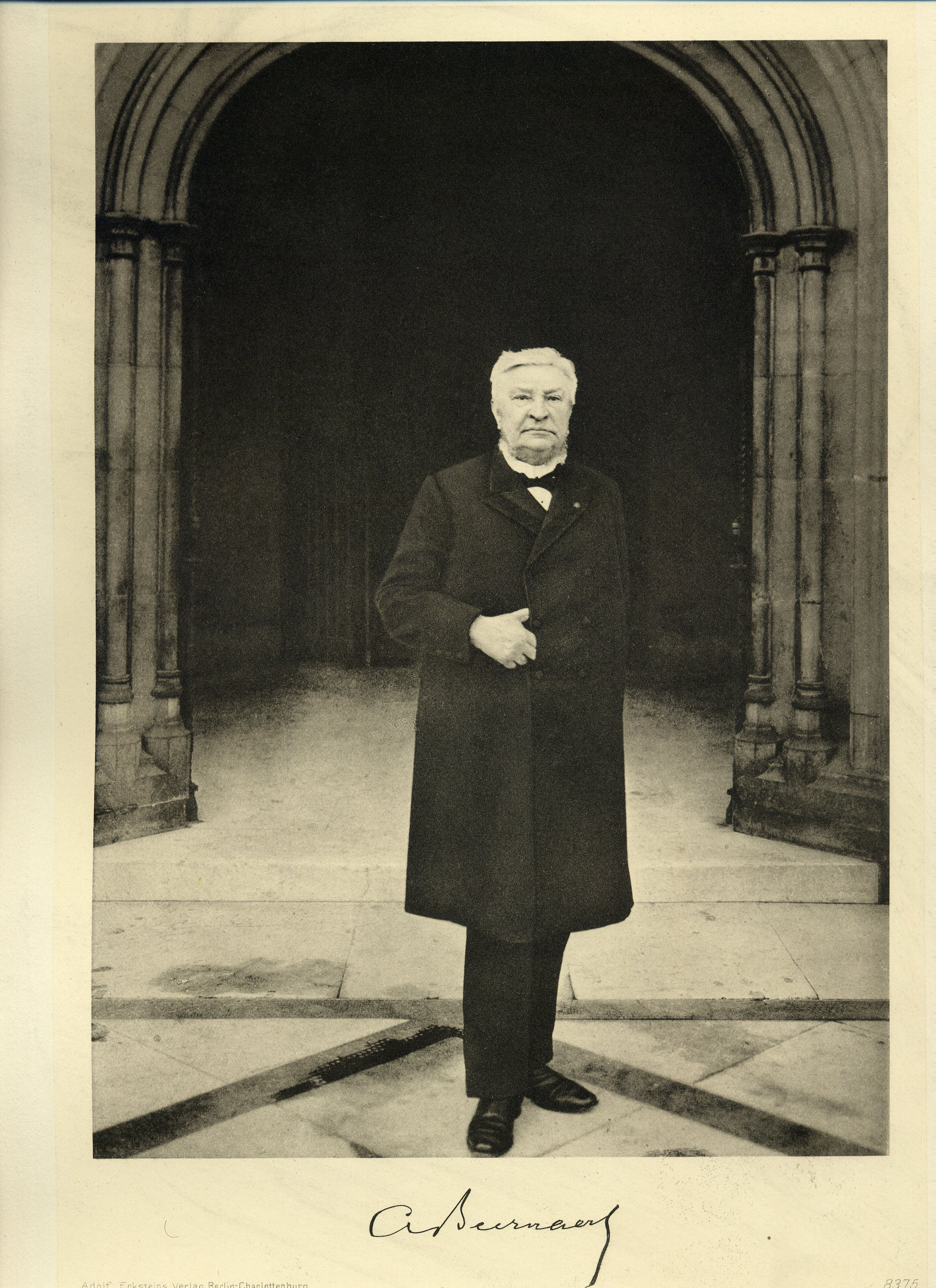 Portrait de Auguste Beernaert vers 1900 paru dans "La Belgique d'aujourd'hui", sous la direction de Gustave DELTOUR, Berlin-Charlottenburg, Adolf Eckstein, vers 1908. Scannée et mise en forme par Henrotte Damien le 13 janvier 2007.